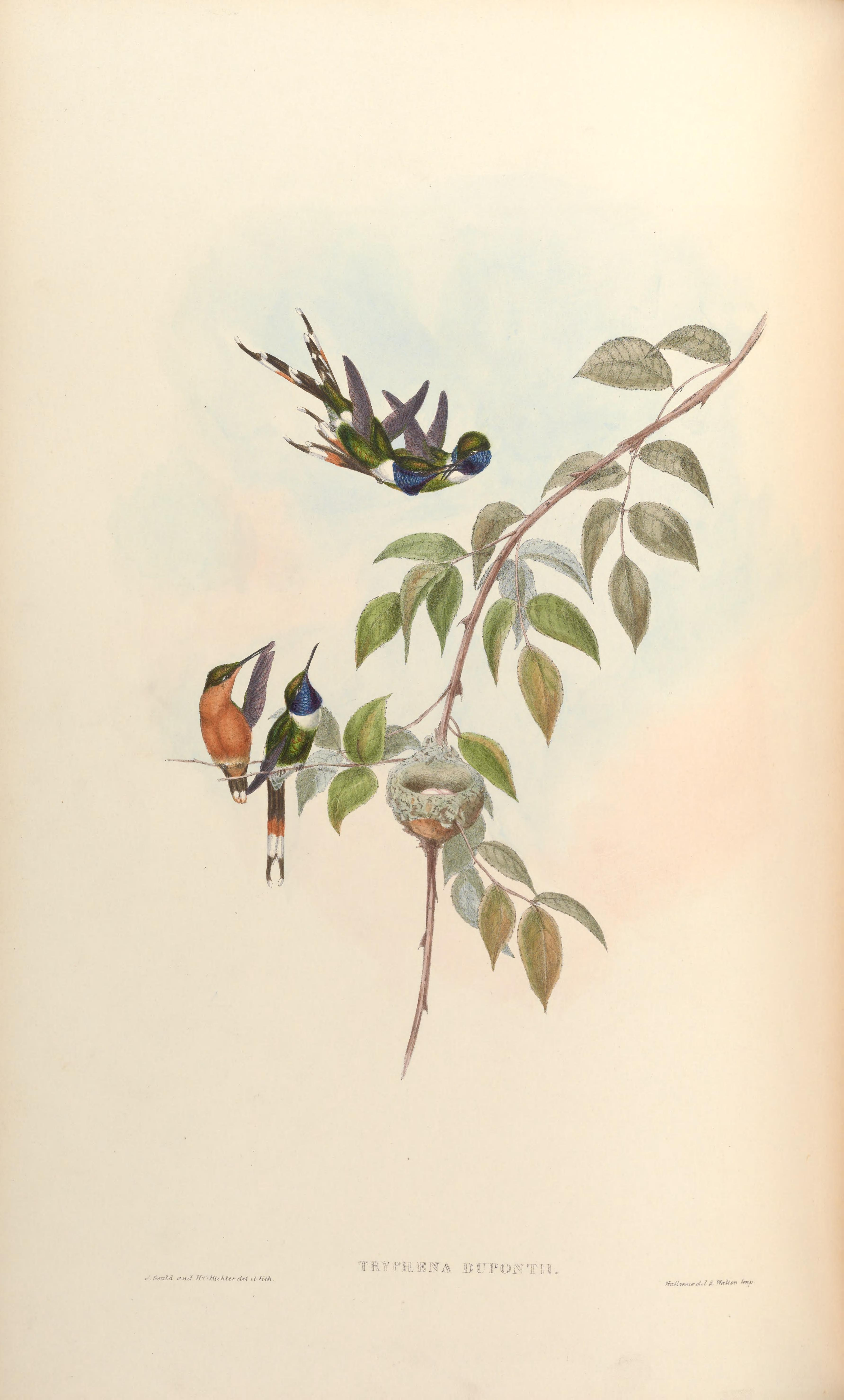 Tryphaena duponti = Tilmatura duponti [1]